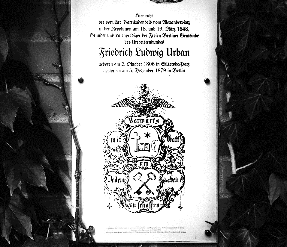 Gedenktafel für Friedrich Ludwig Urban auf dem Friedhofspark der Freireligiösen Gemeinde Berlin, Pappelallee 15/16, 10437 Berlin